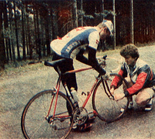 Zbigniew Piątek (po prawej) i Jacek Bodyk, polscy kolarze szosowi